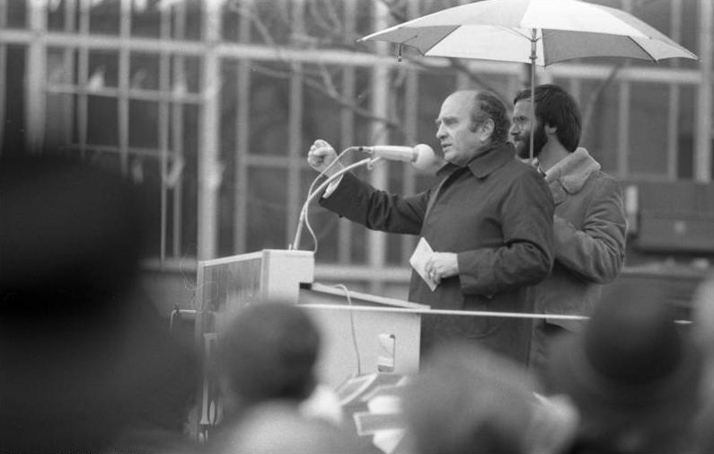 25.2.1983 Wahlkundgebung der FDP mit Bundesminister Dr. Otto Graf Lambsdorff in Köln